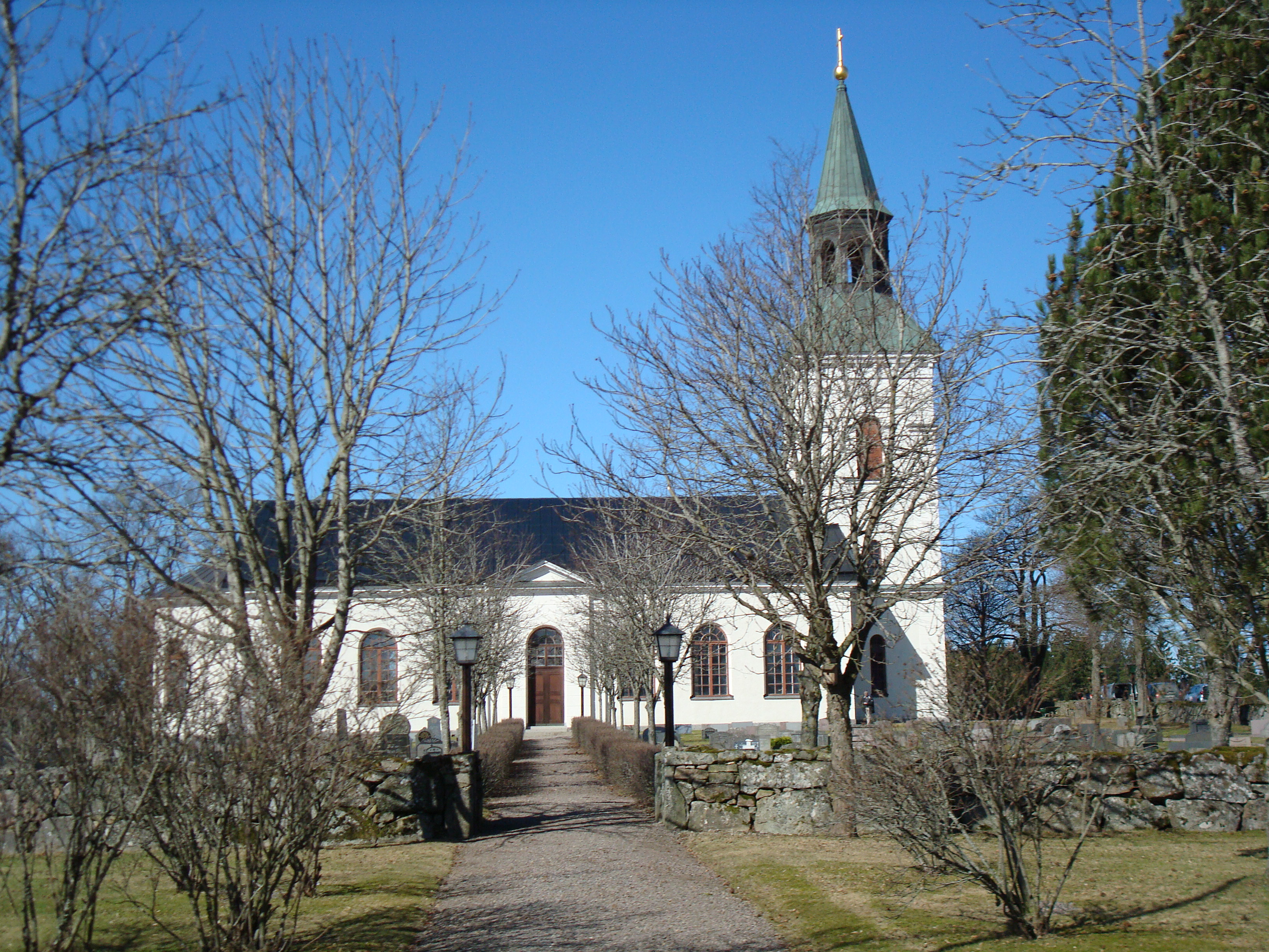 Hus i Svarttorp